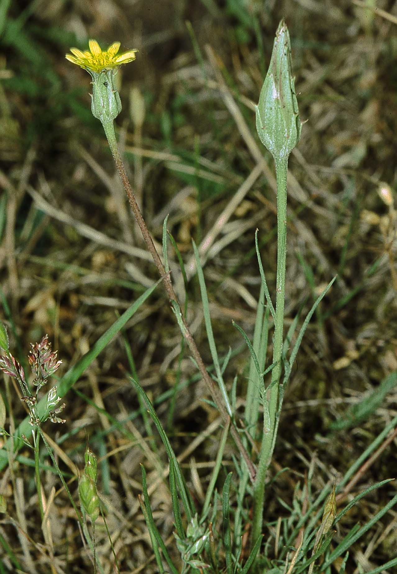 Podospermum laciniatum - General view - Unterfranken, Germany